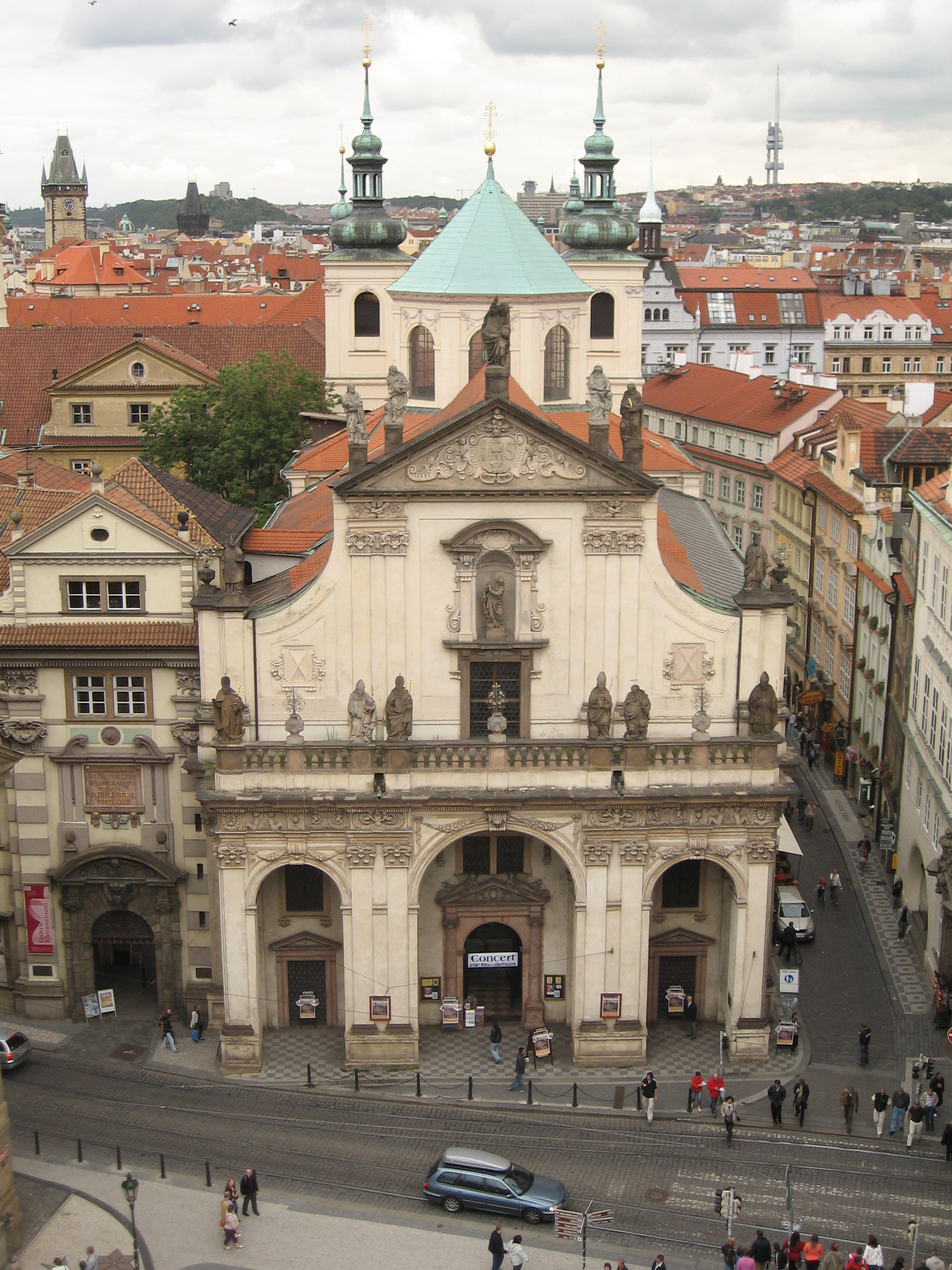 Kostel Svatého Salvátora na Křižovnickém náměstí ze staroměstské mostecké věže Karlova mostu